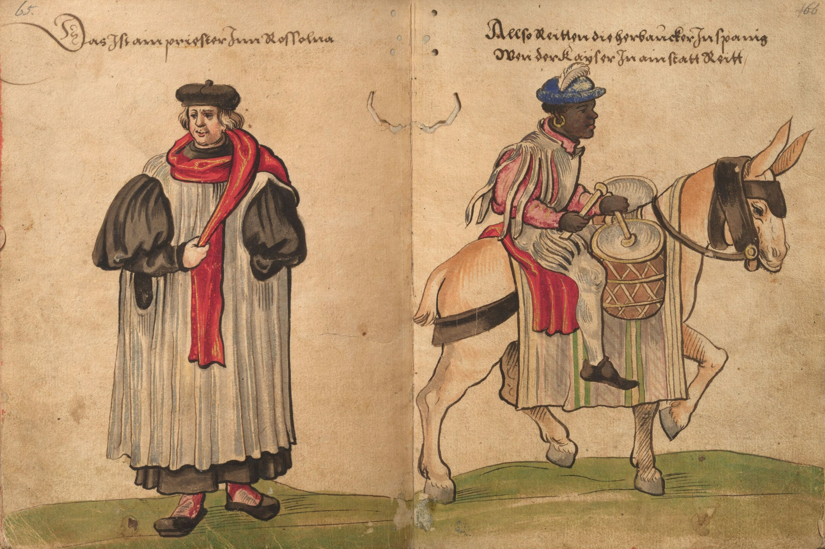 "Trachtenbuch" des Christoph Weiditz, Germanisches Nationalmuseum Nürnberg, Hs. 22474. Bl. 65–66 Ein Priester in Roussillon / Heerpauker beim Einzug des Kaisers